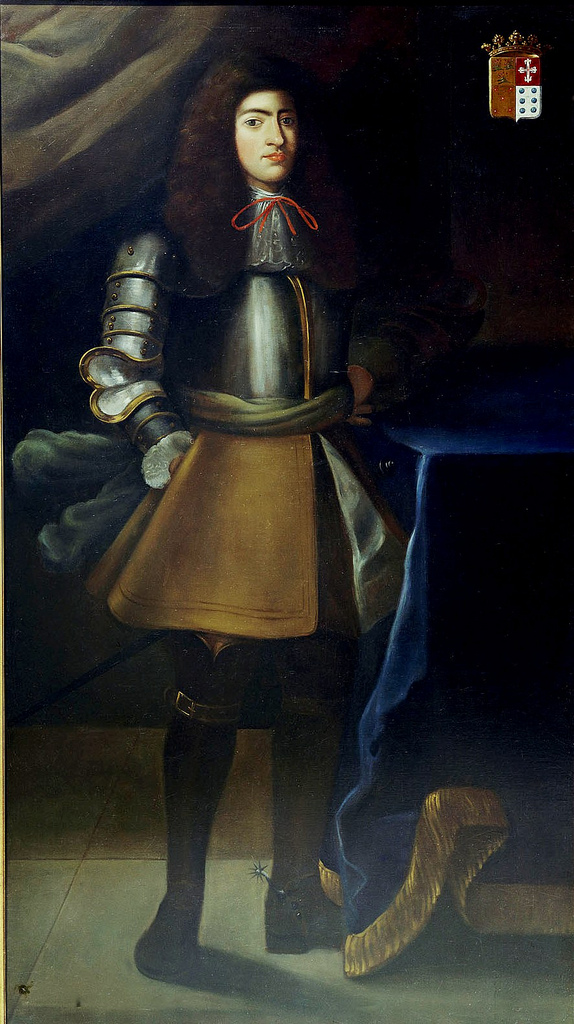 Luís Gomes da Mata, 7º Correio-Mor de Portugal, pintura a óleo do século XVII